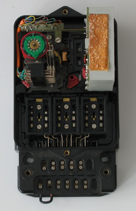 Geöffneter Rundsteuerempfänger in separater Ausführung